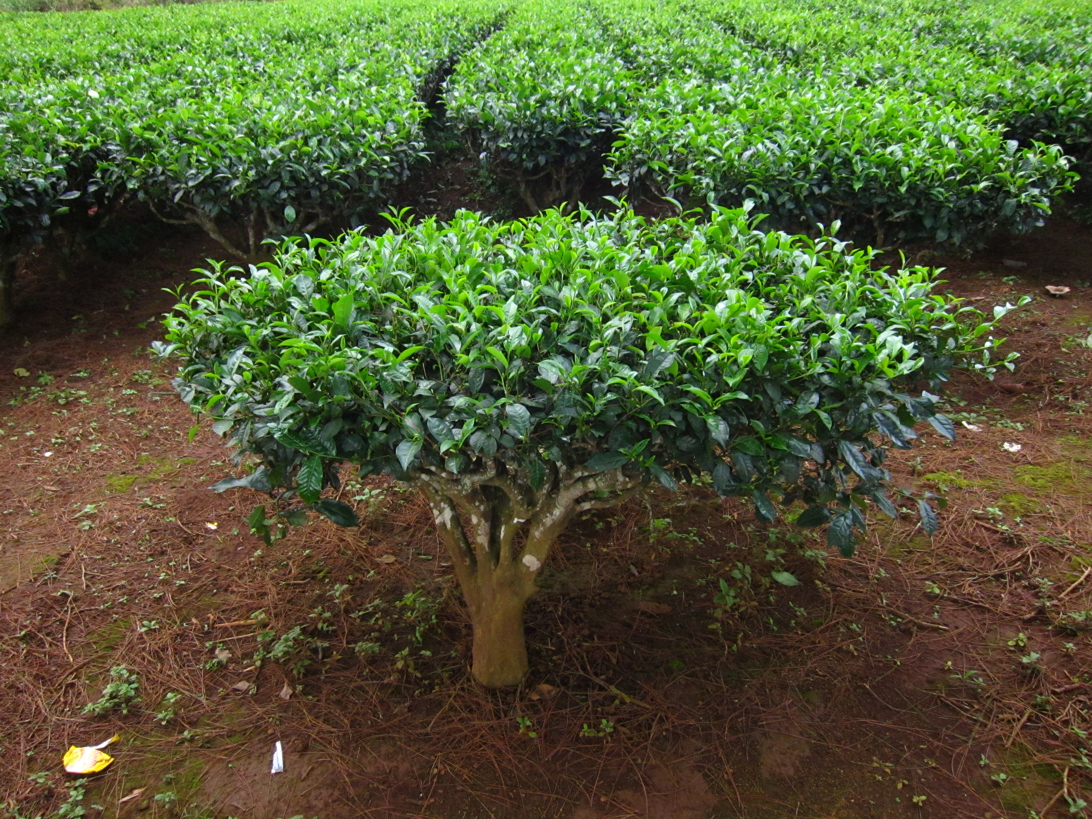 Camellia sinensis (L.) Kuntze, 1887